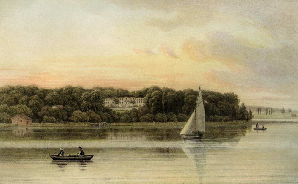 Vallstanäs herrgård, vy över sjön Fysingen